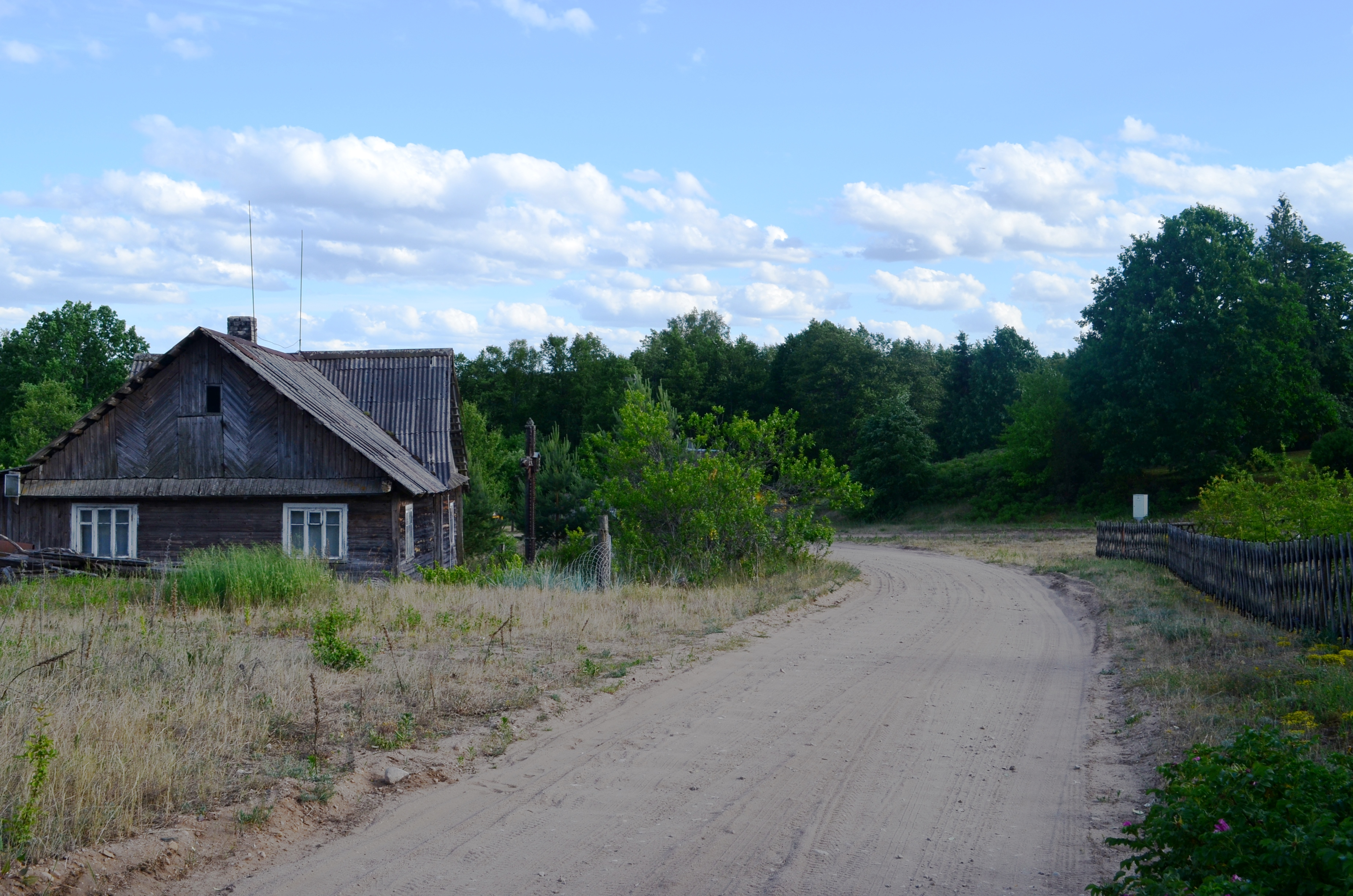 Mergežeris, Varėnos raj.